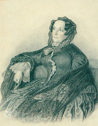 Княгиня Вера Фёдоровна Вяземская, урождённая княжна Гагарина (1790—1886)